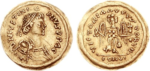 Tremisse do rei ostrogótico Totita